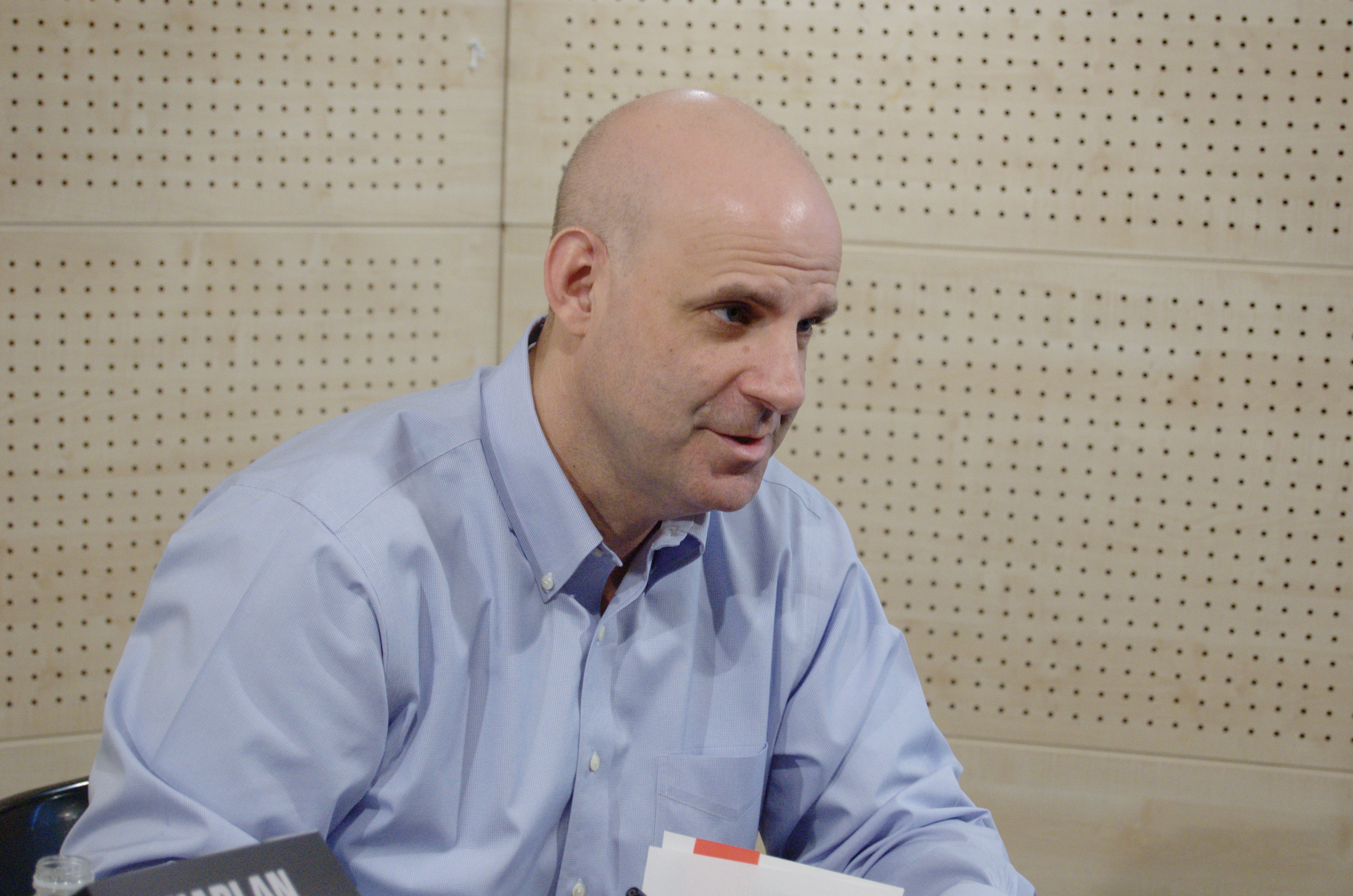 Harlan Coben lors d'une séance de dédicace à la Fnac St Lazare, Paris, France. 12 mars 2009.